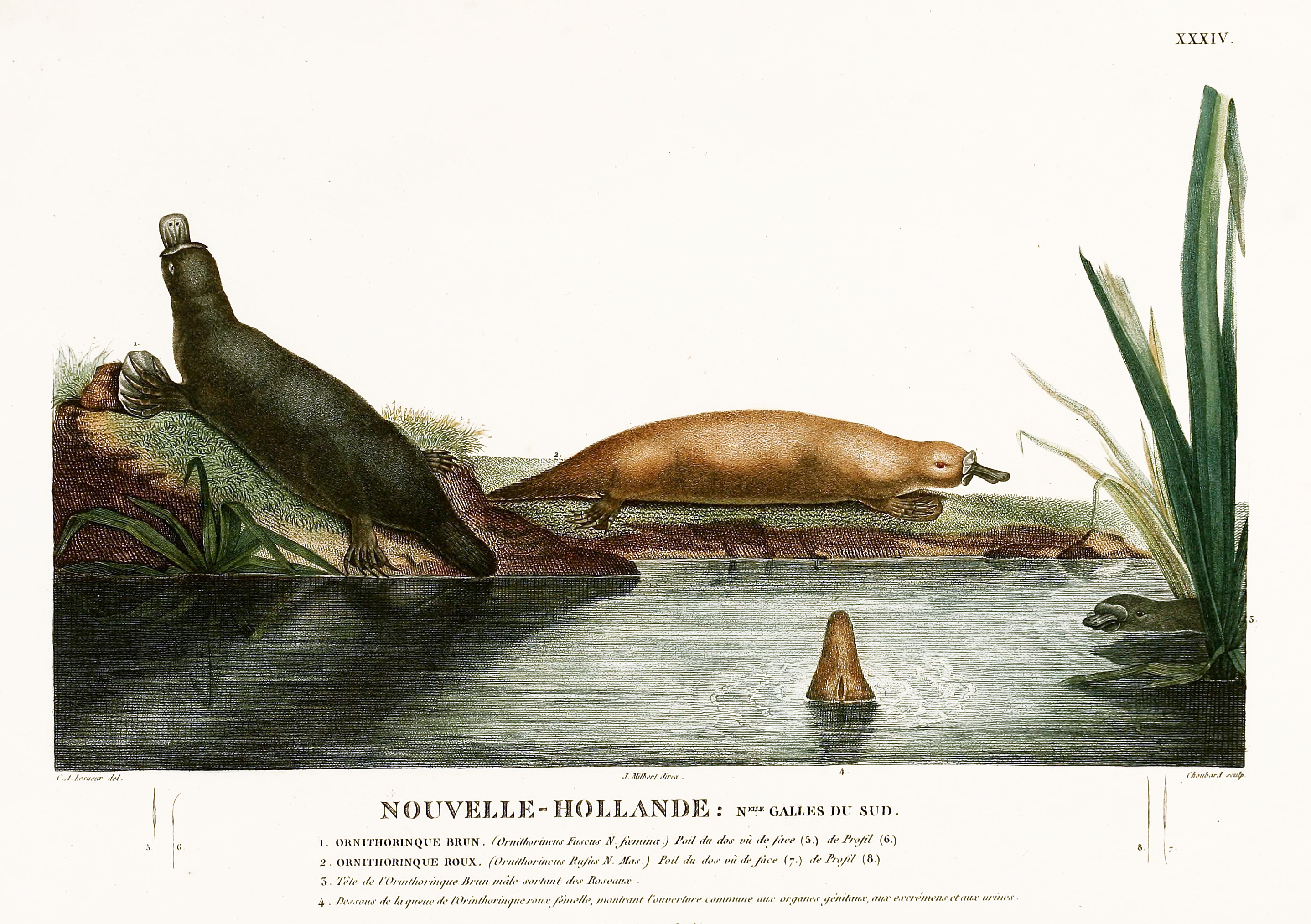 Ornythorinques